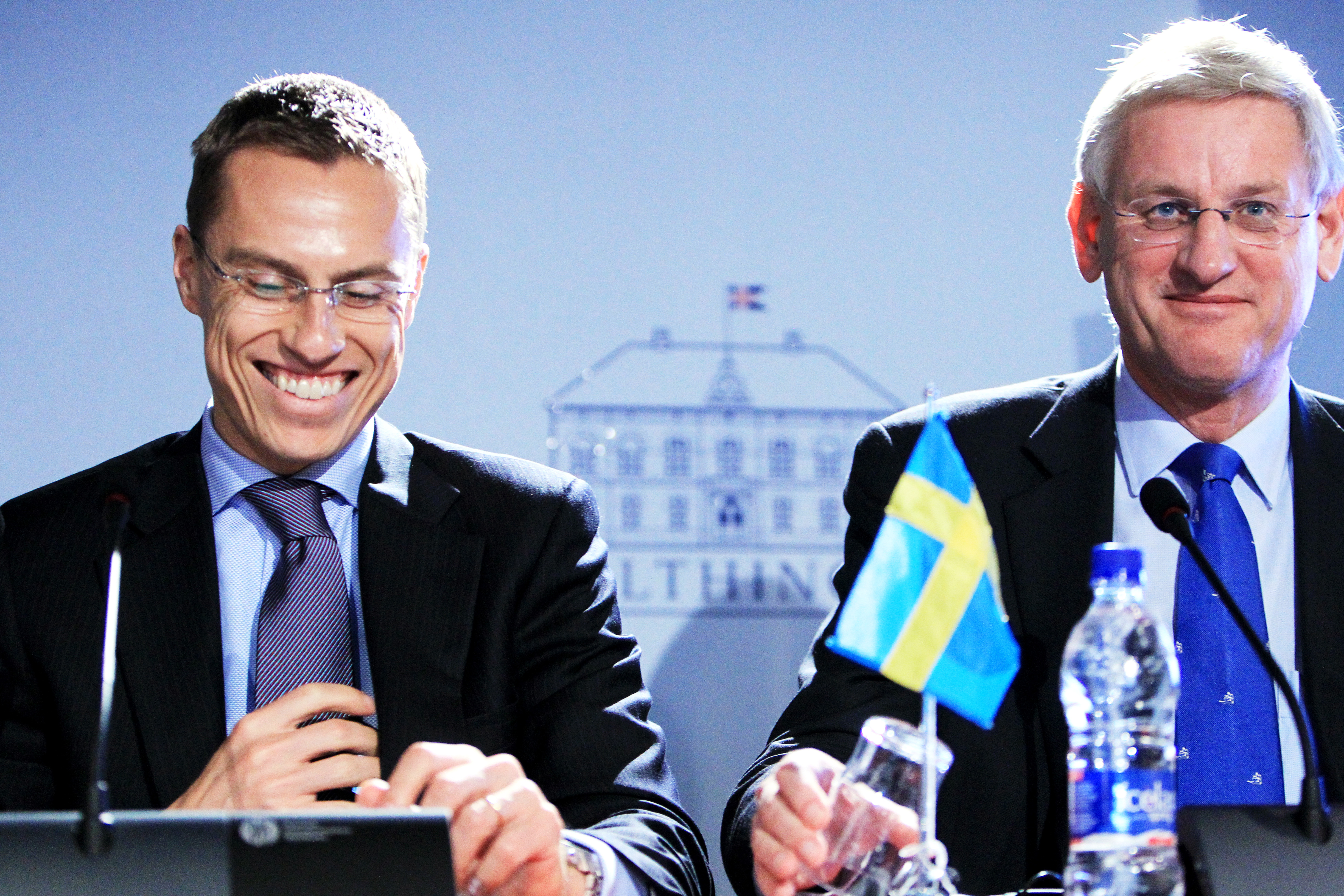 Finlands utrikesminister Alexander Stubb och Sveriges utrikesminister Carl Bildt under Nordiska Rådets session i Reykjavik på Island 2010-11-03.